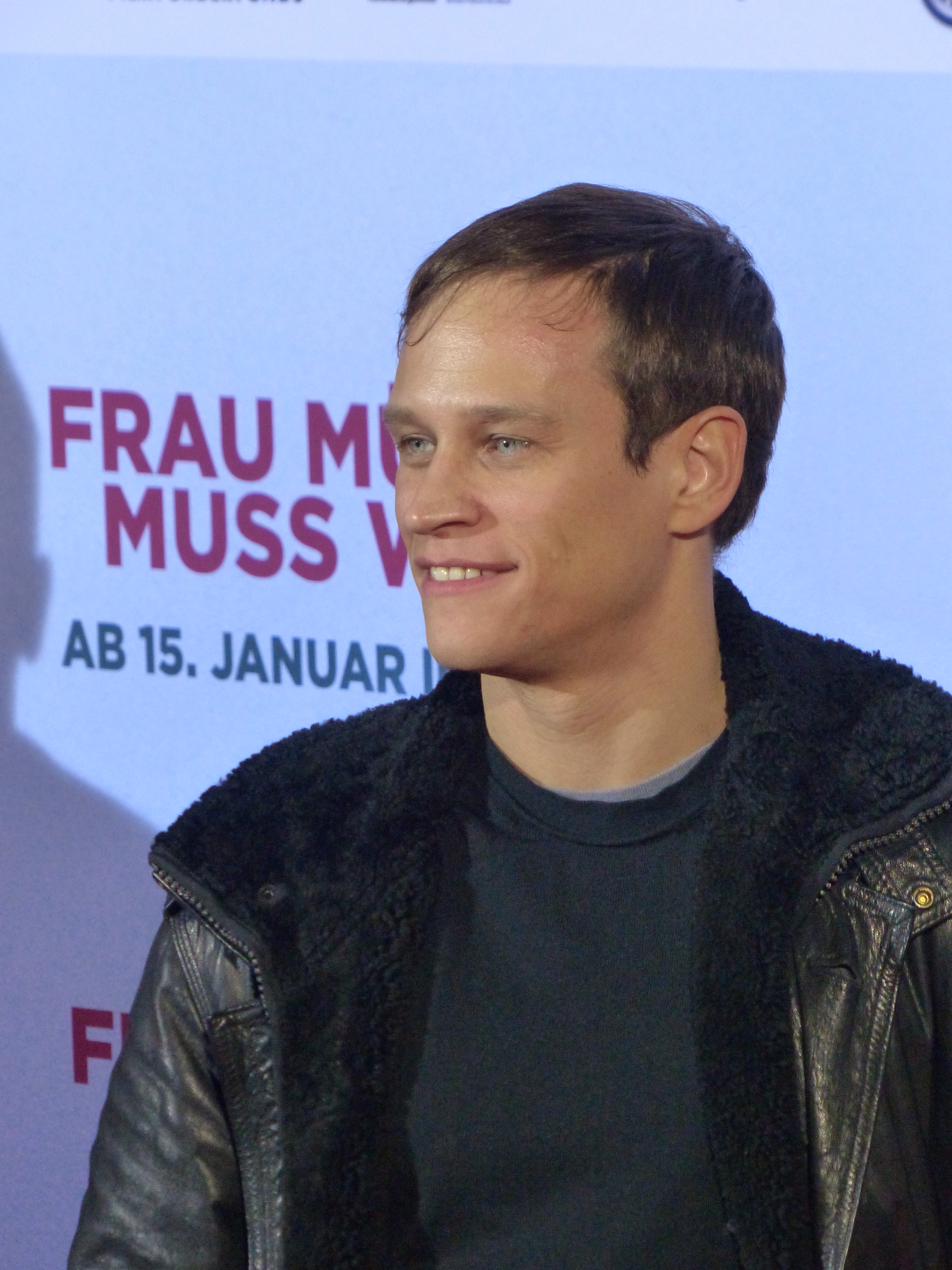 Vinzenz Kiefer bei der Kinopremiere von "Frau Müller muss weg", Januar 2015, Cinedom Köln